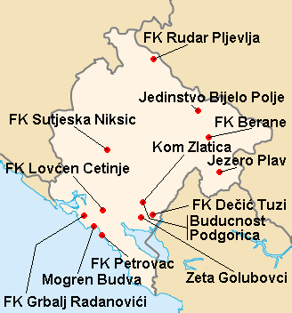 Répartition des clubs en Prva Crnogoska Liga 2006-2007.